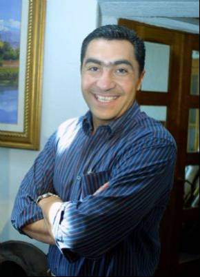 Jorge Camacho, periodista mexicano.